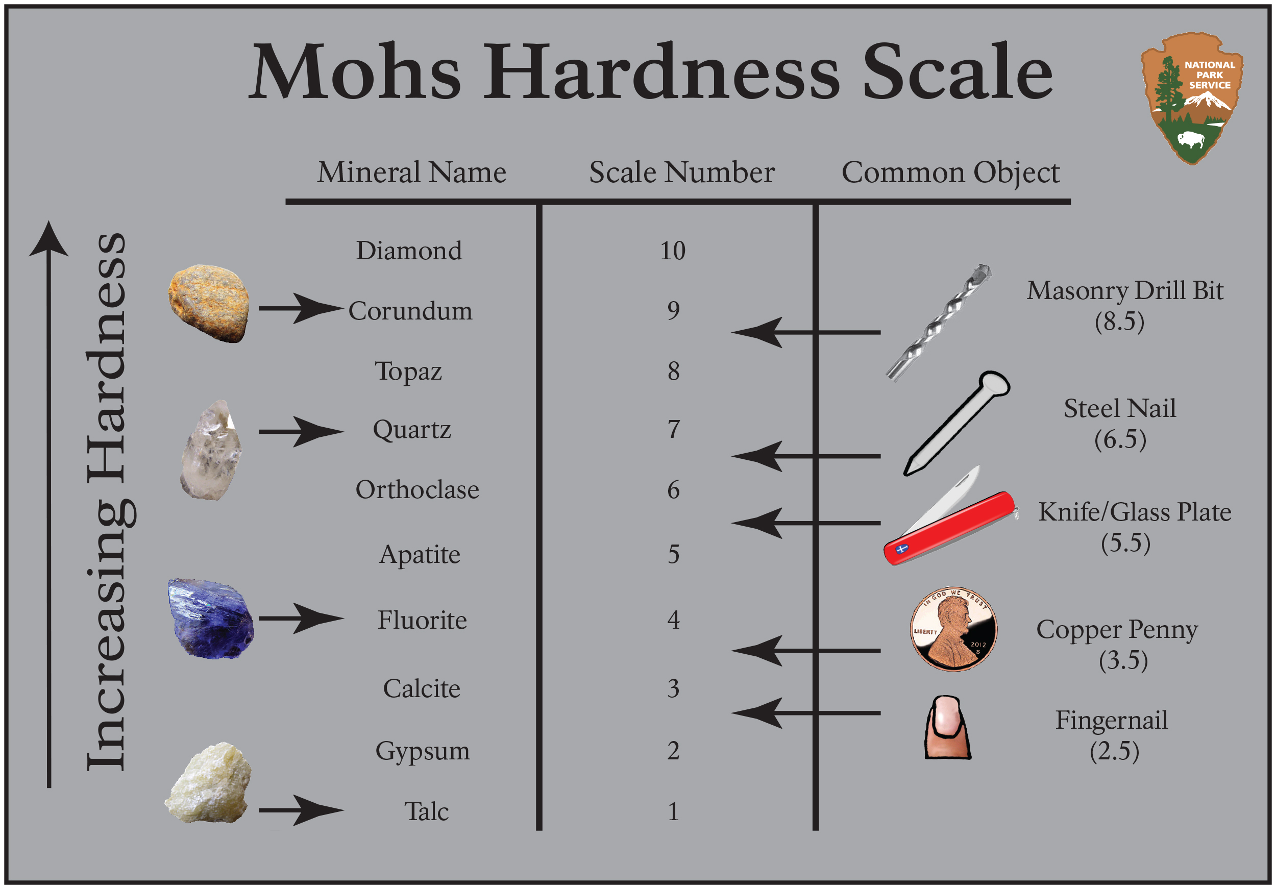 Mohs'i skaala